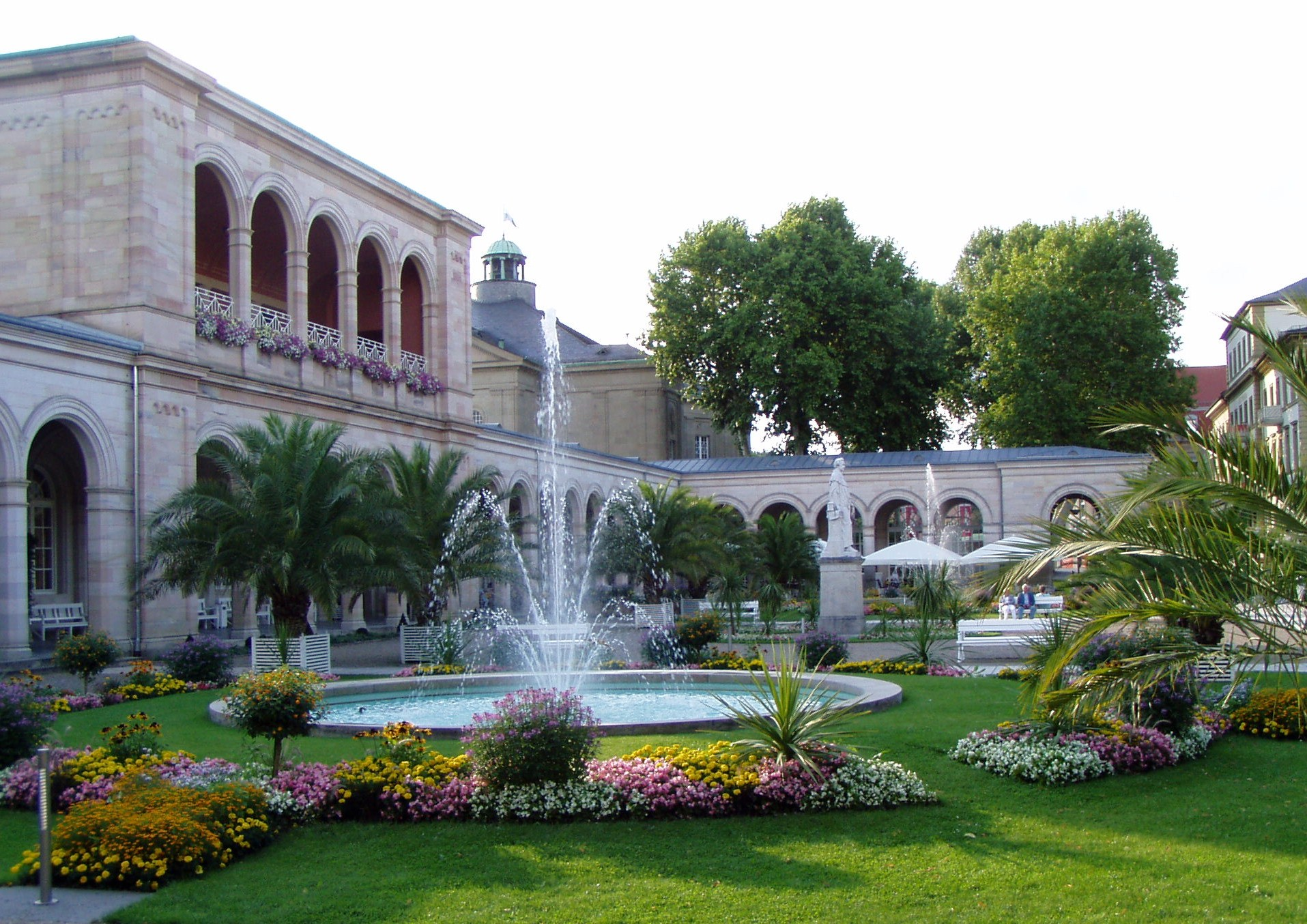 Arcades in Bad Kissingen, Bavaria